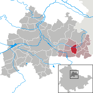 Guthmannshausen in Thuringia - District Sömmerda